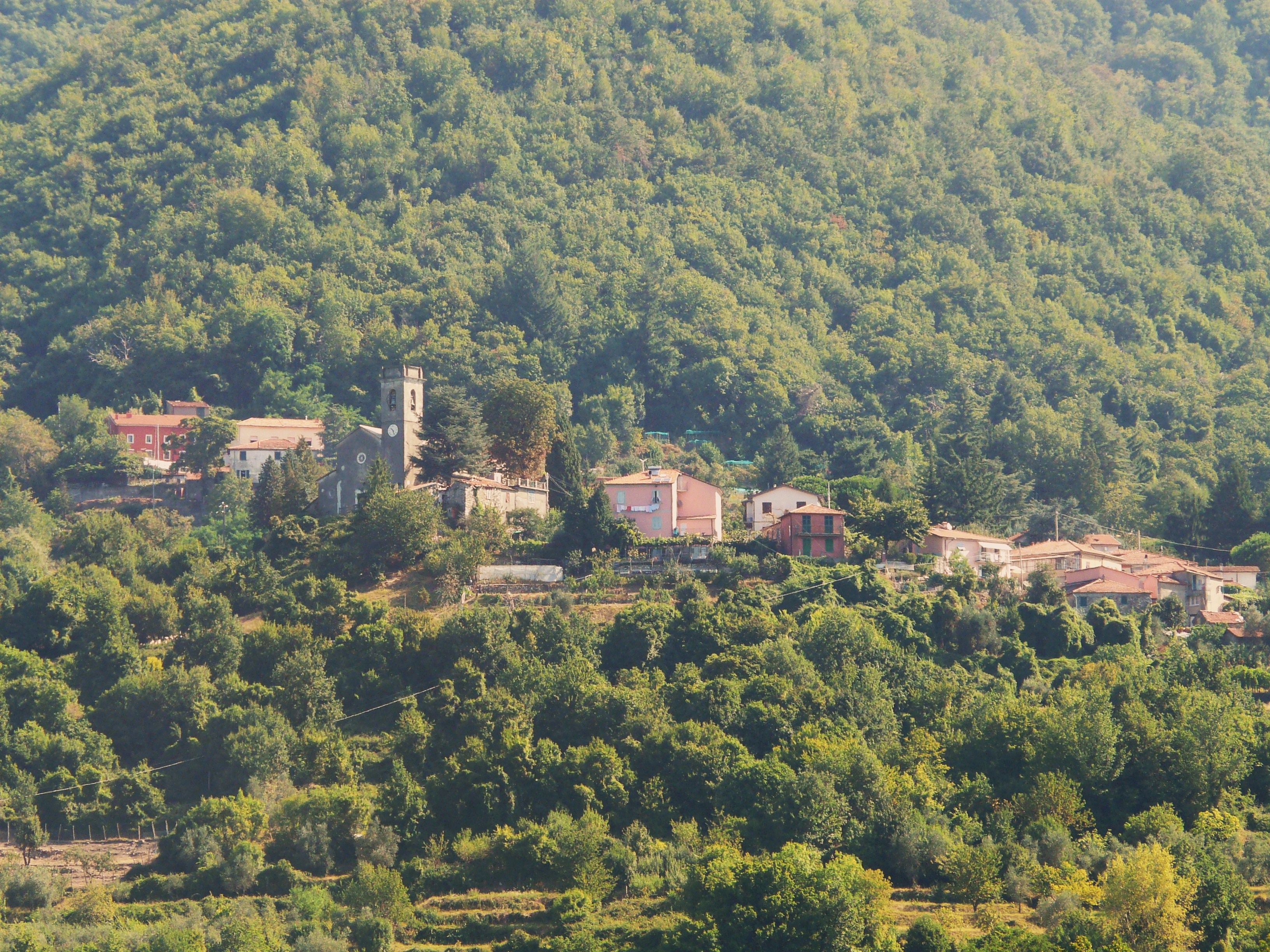 Frazione di Santa Maria, Calice al Cornoviglio, Liguria, Italia